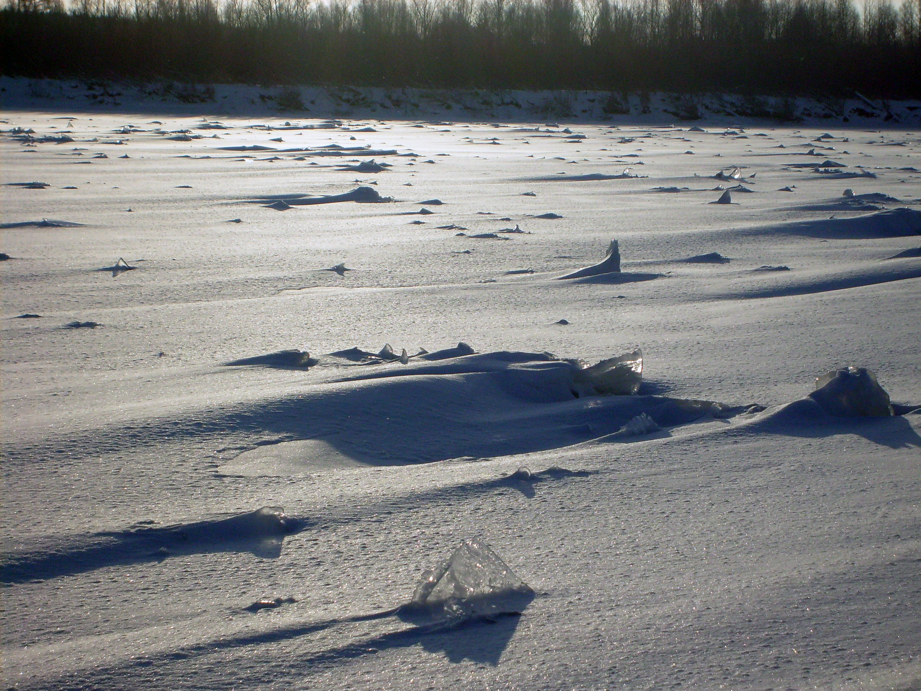 Торосы